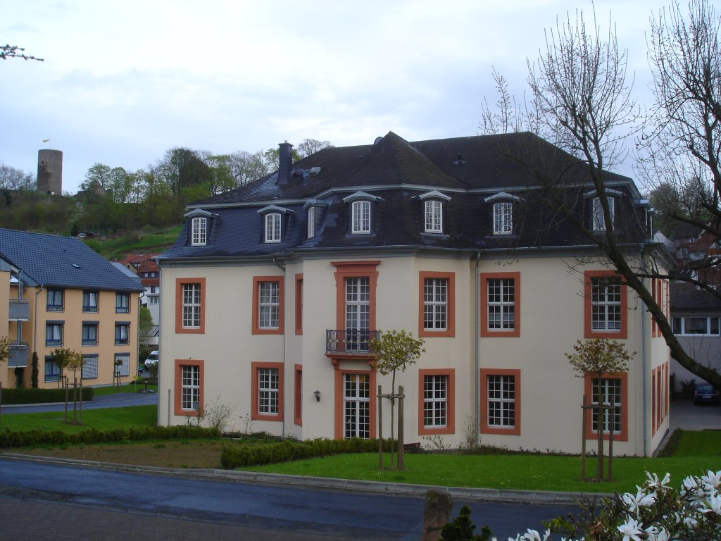 Das Maximilianschloss Jesberg von der Gartenseite aus gesehen